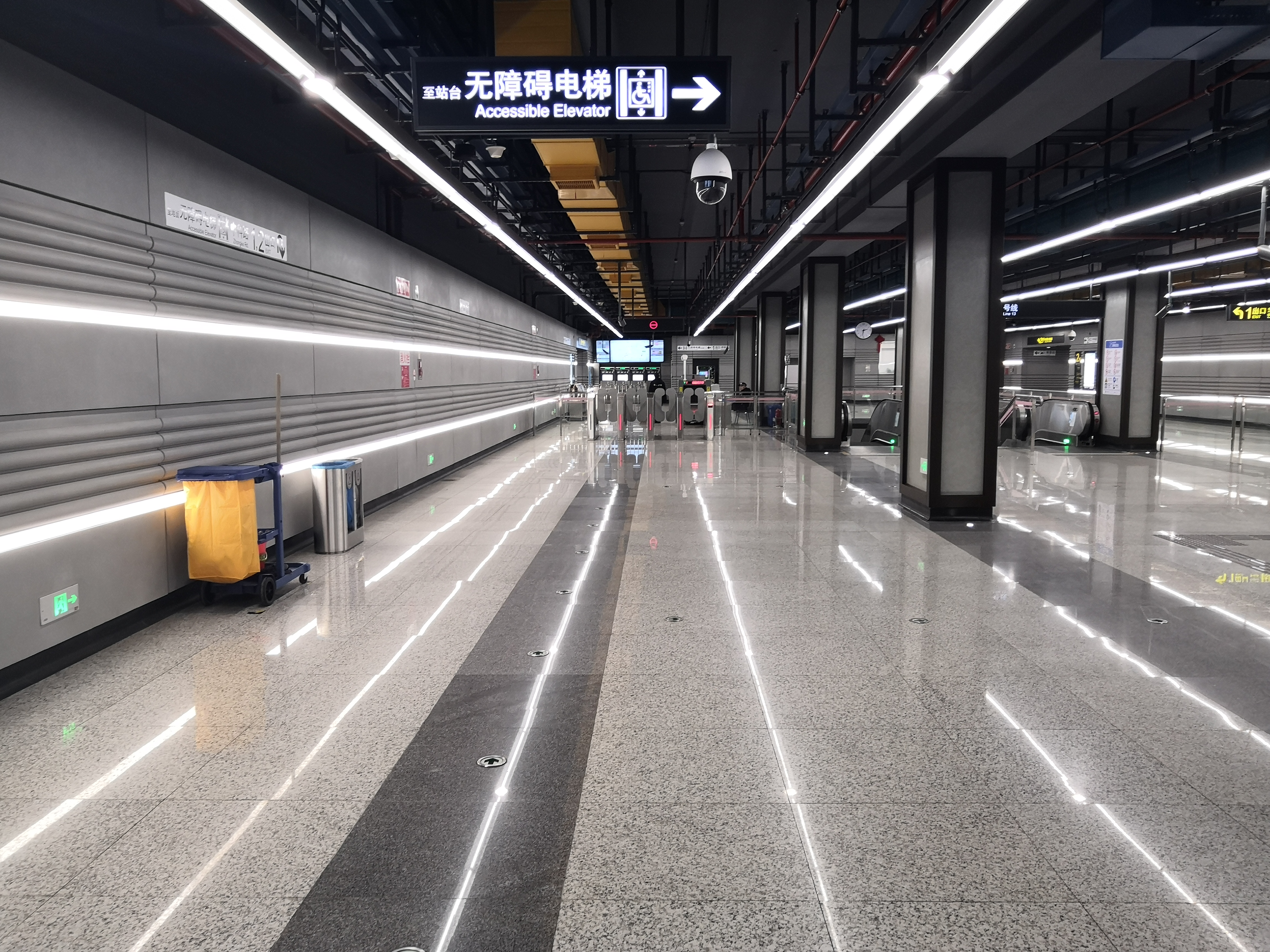 学林路站站厅